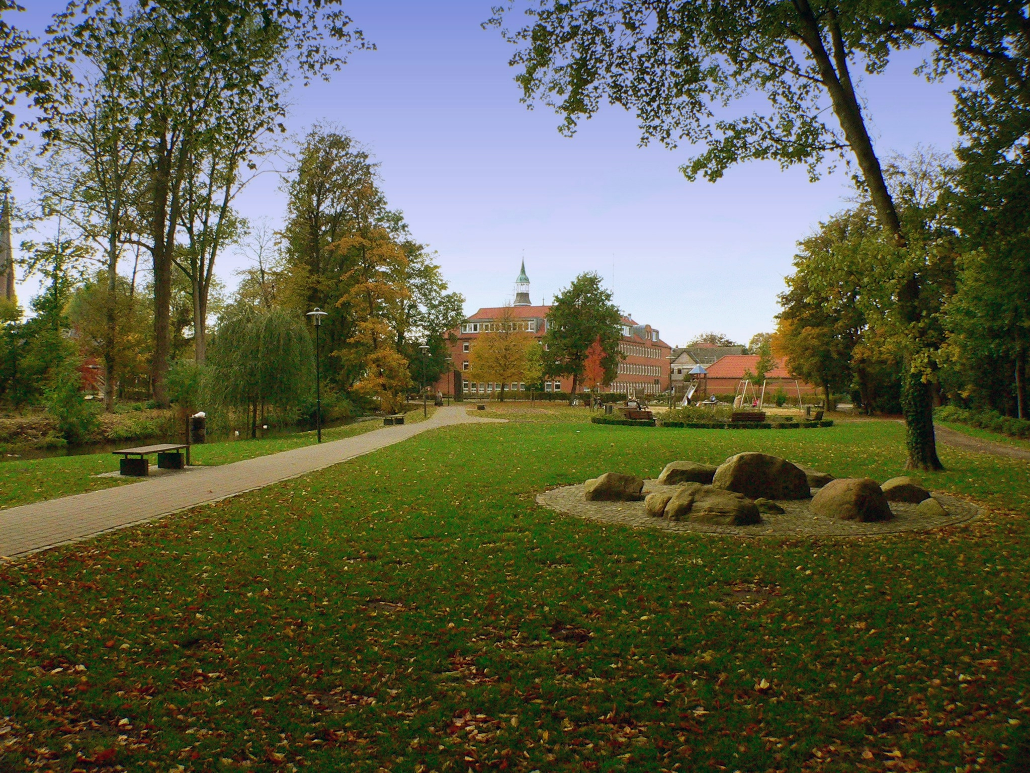 Stadtpark Quakenbrück